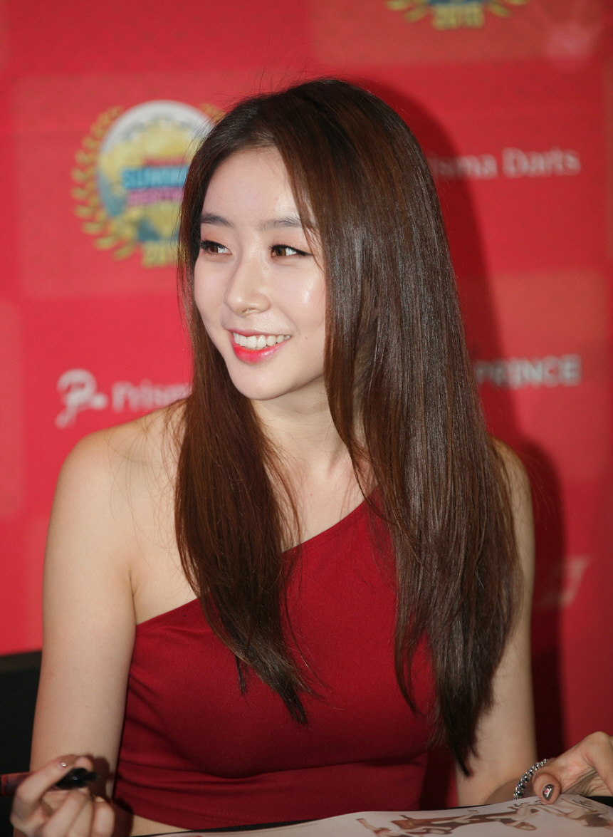 스텔라(Stellar) 2015 피닉스 섬머 페스티벌 일산 킨텍스